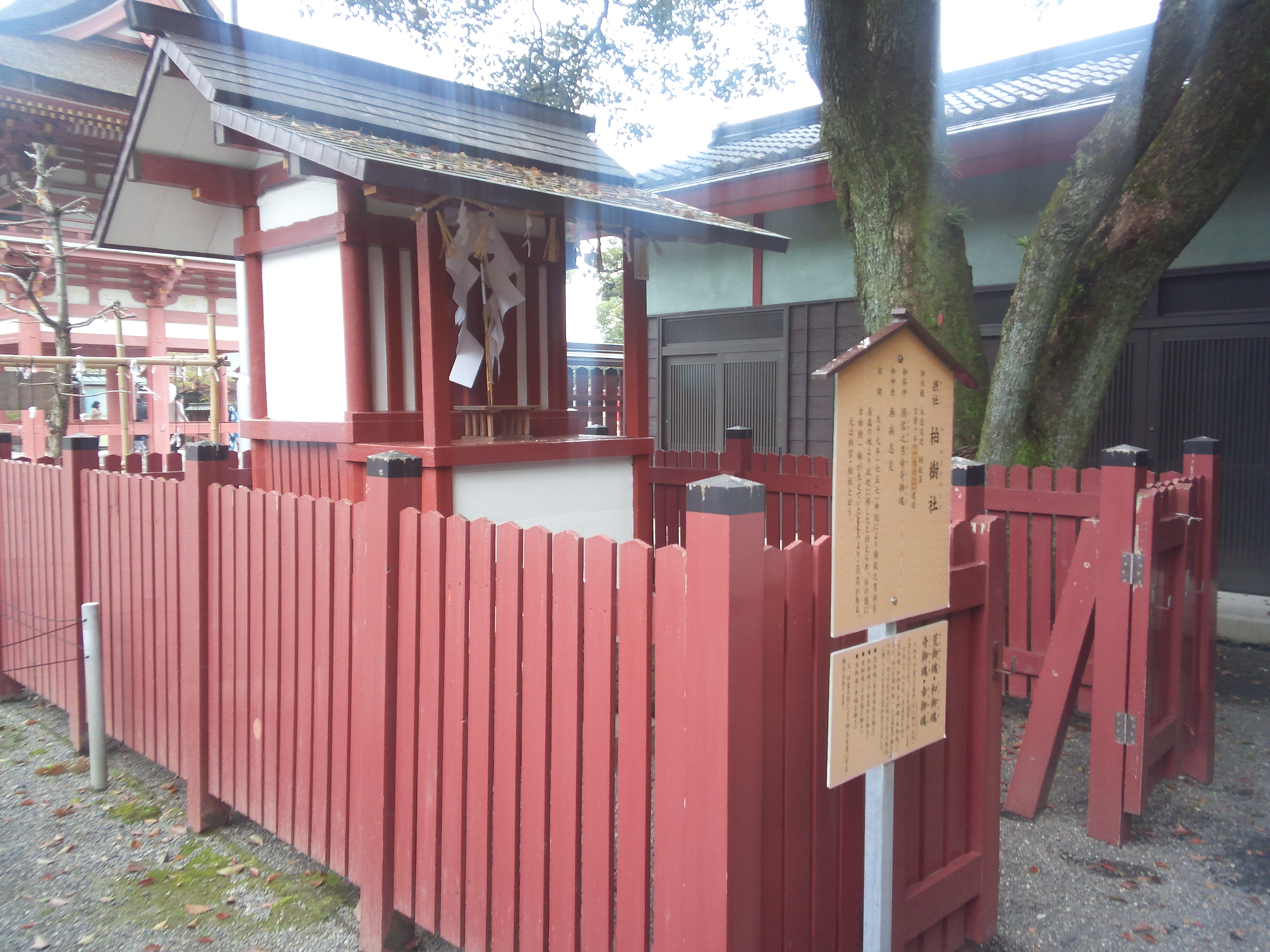 津島神社 - 柏樹社